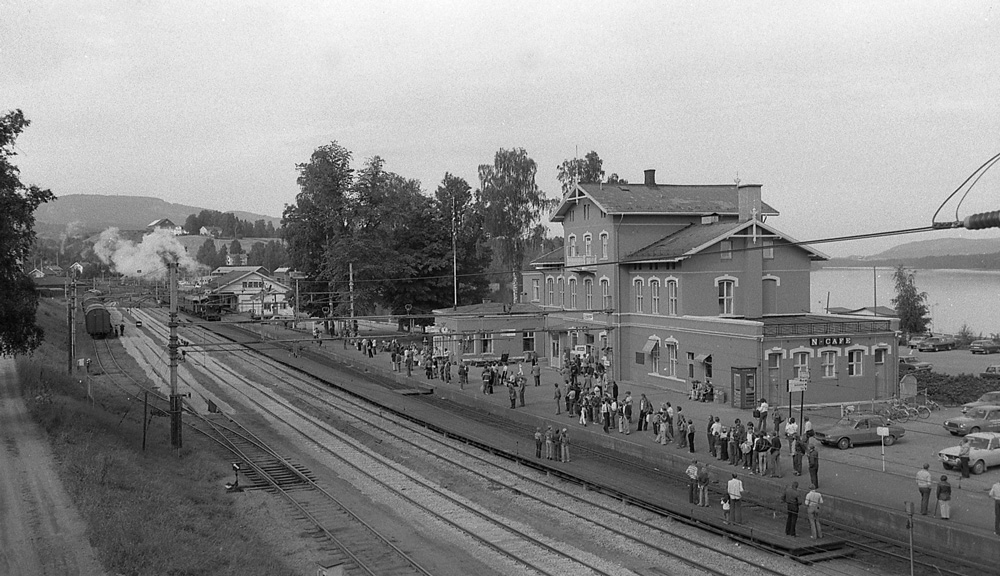 Eidsvoll stasjon under 125års-feiringen 1. september 1979.